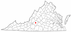 va maps